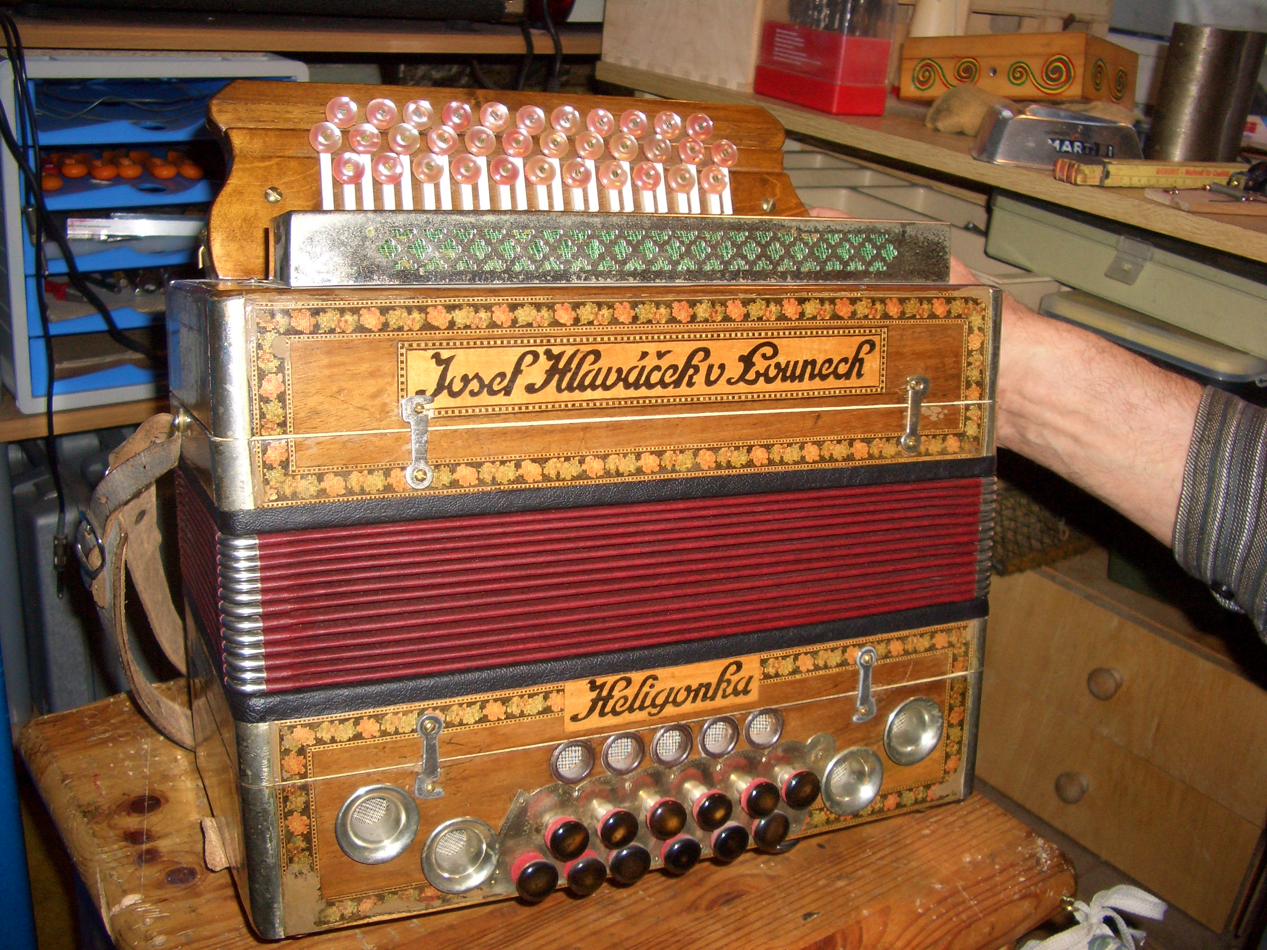 Josef Hlaváček Harmonika baujahr nicht bekannt.